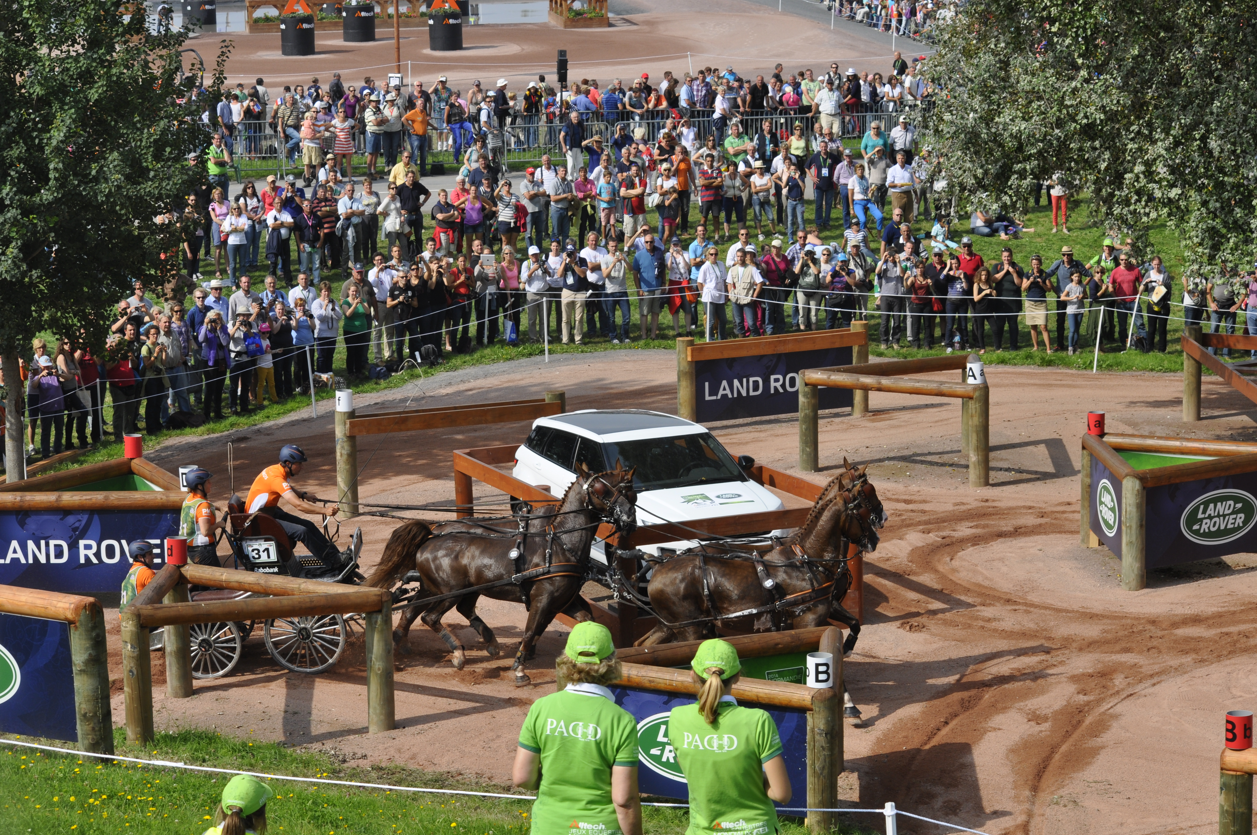 Koos de Ronde marathon JEM 2014